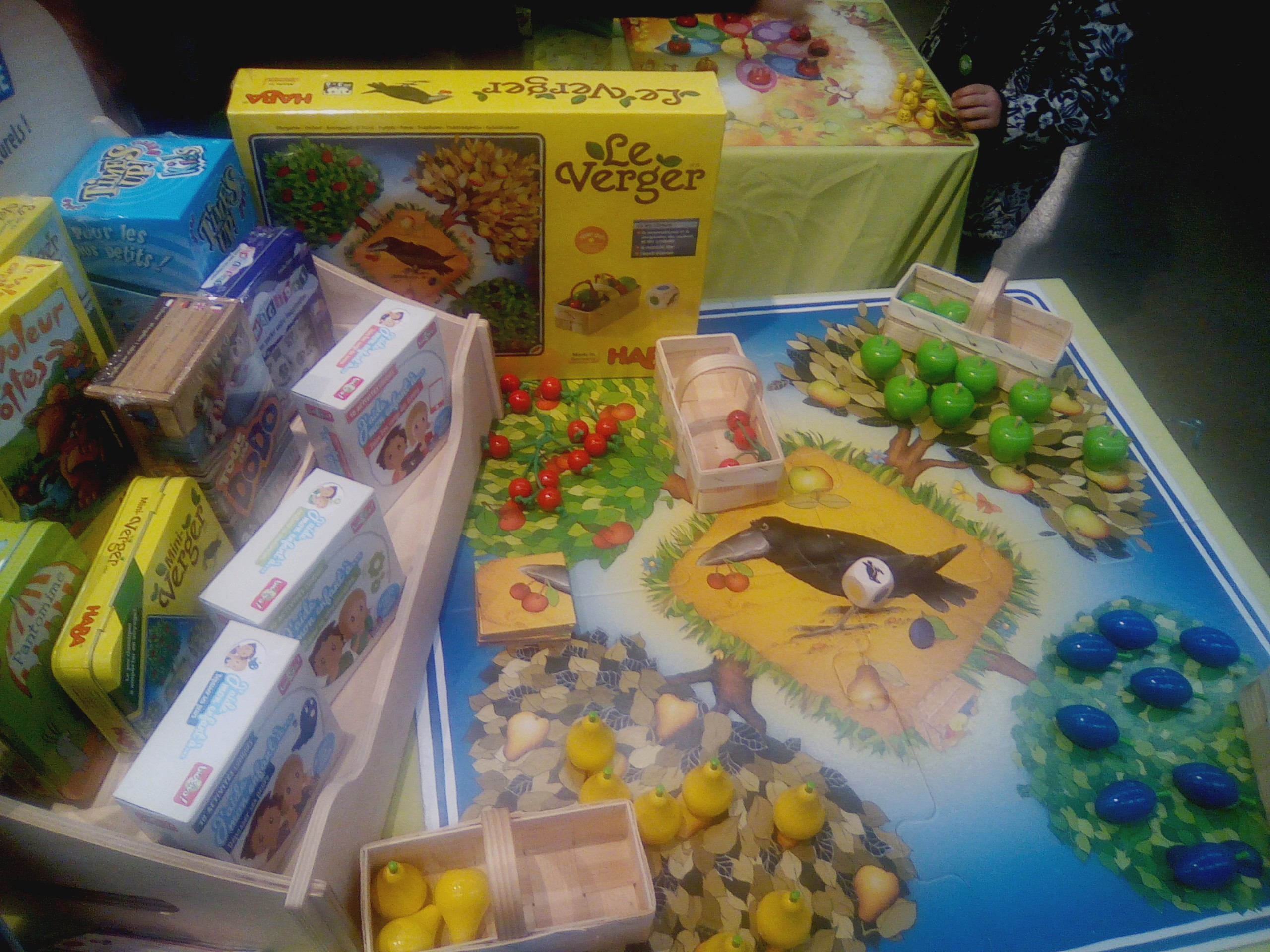 Salon Marjolaine au Parc floral de Paris.